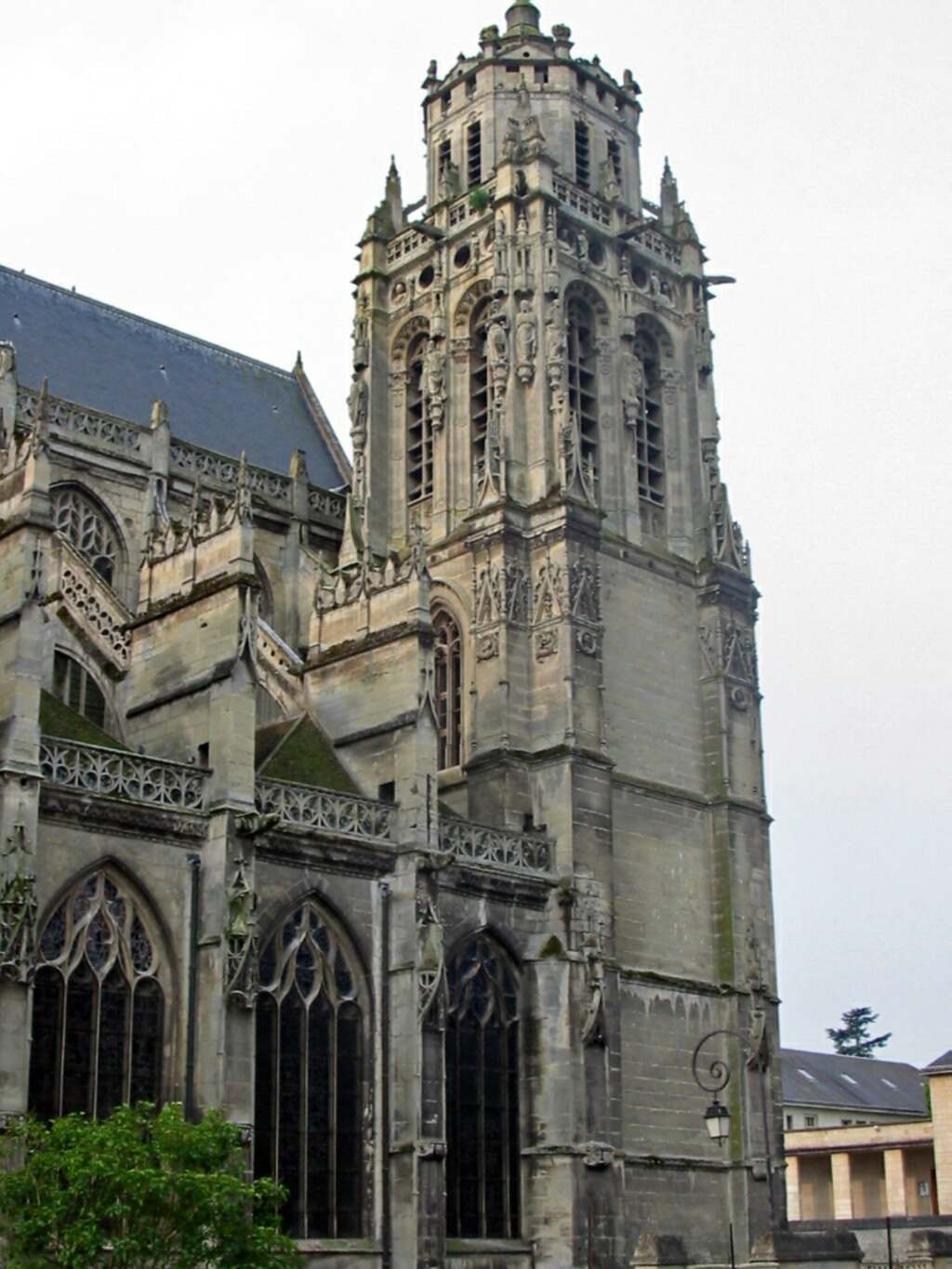 Église de Gisors_clocher001 Photo JH Mora, juin 2005